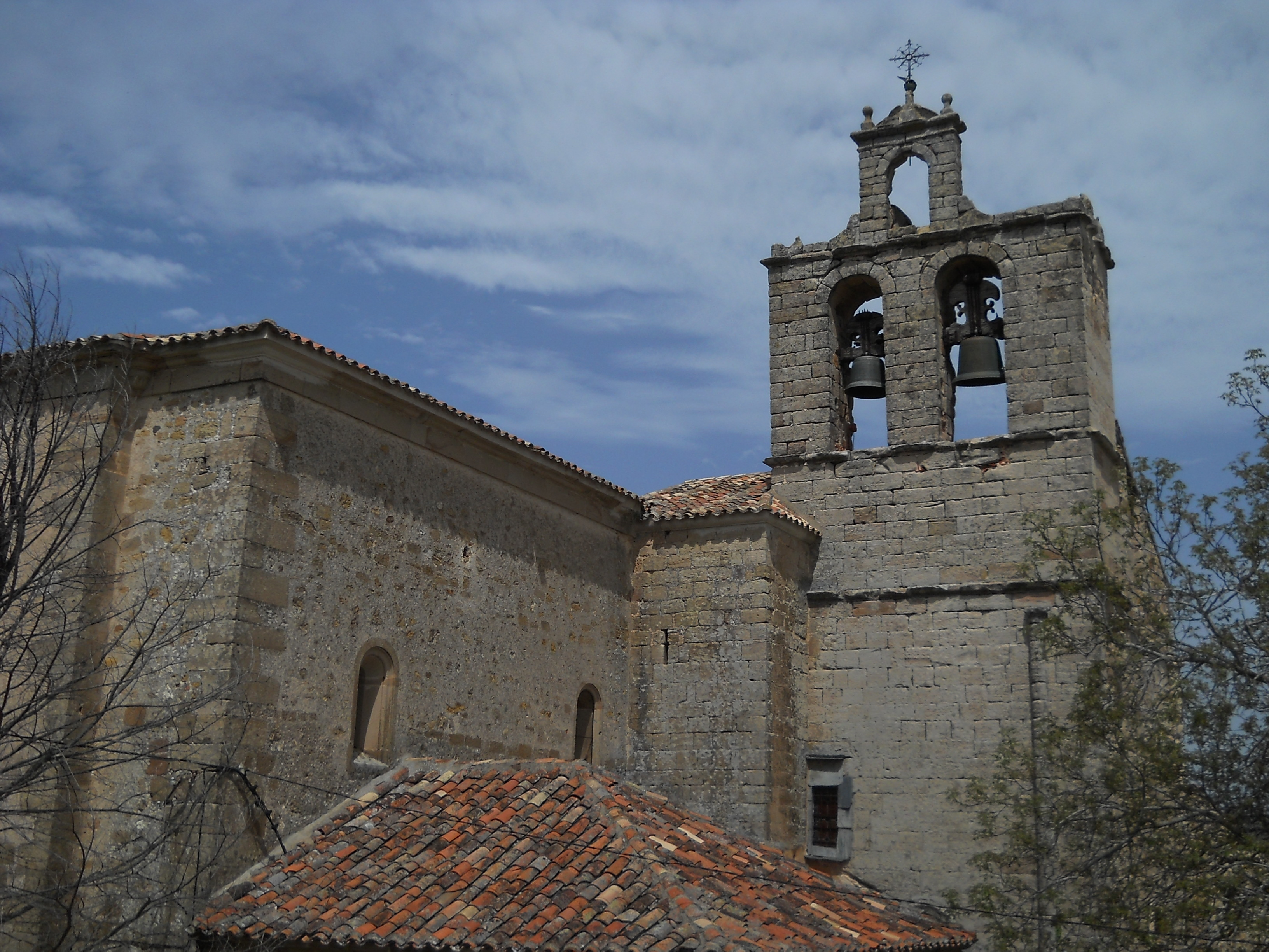 Iglesia de San Bartolomé, Atienza, Guadalajara, España